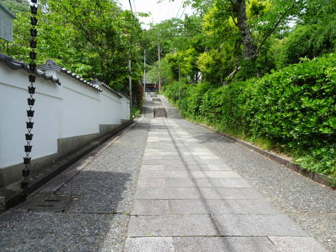 大谷坂の大谷寺周辺